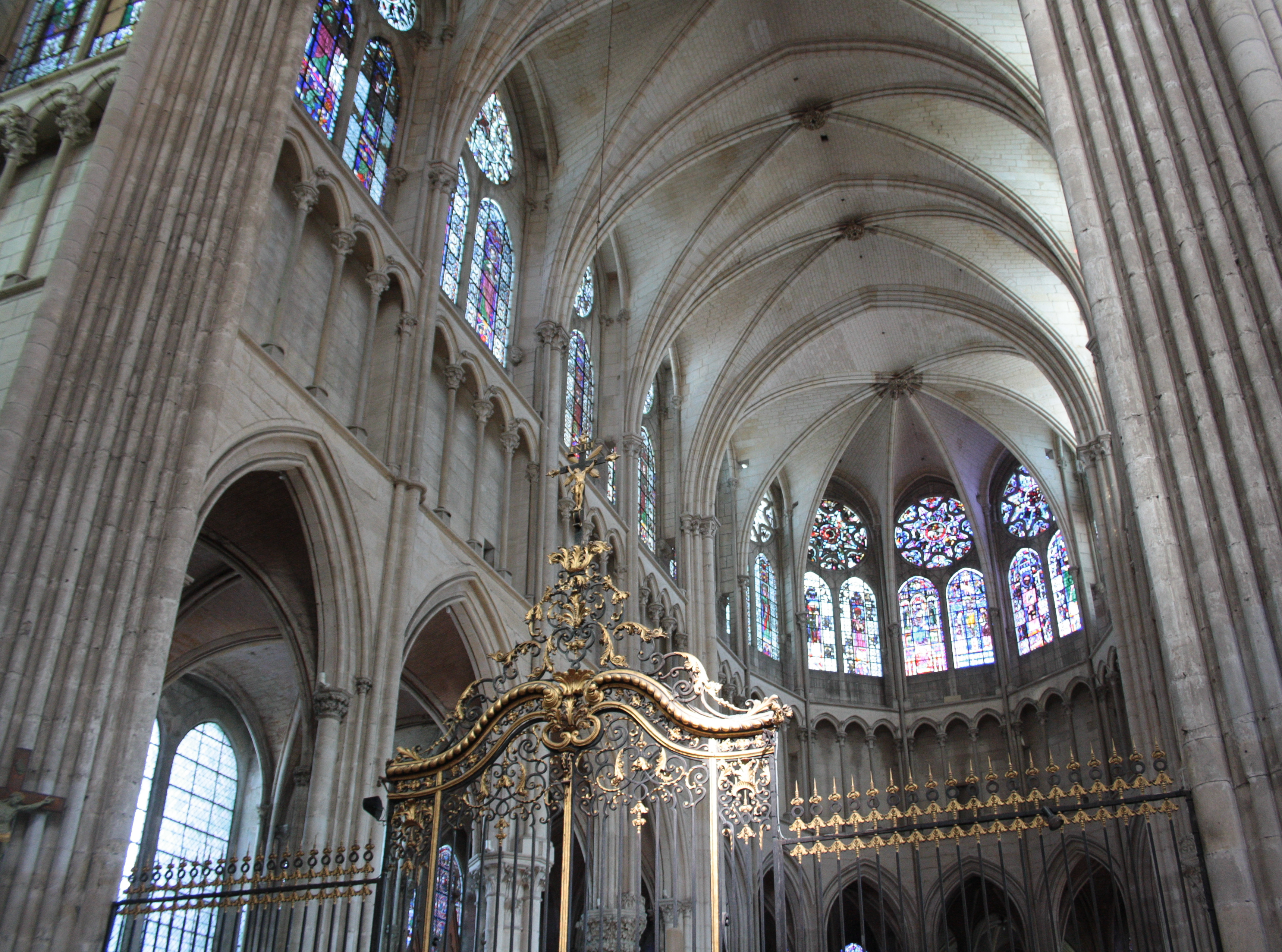 La nef de la cathédrale d'Auxerre